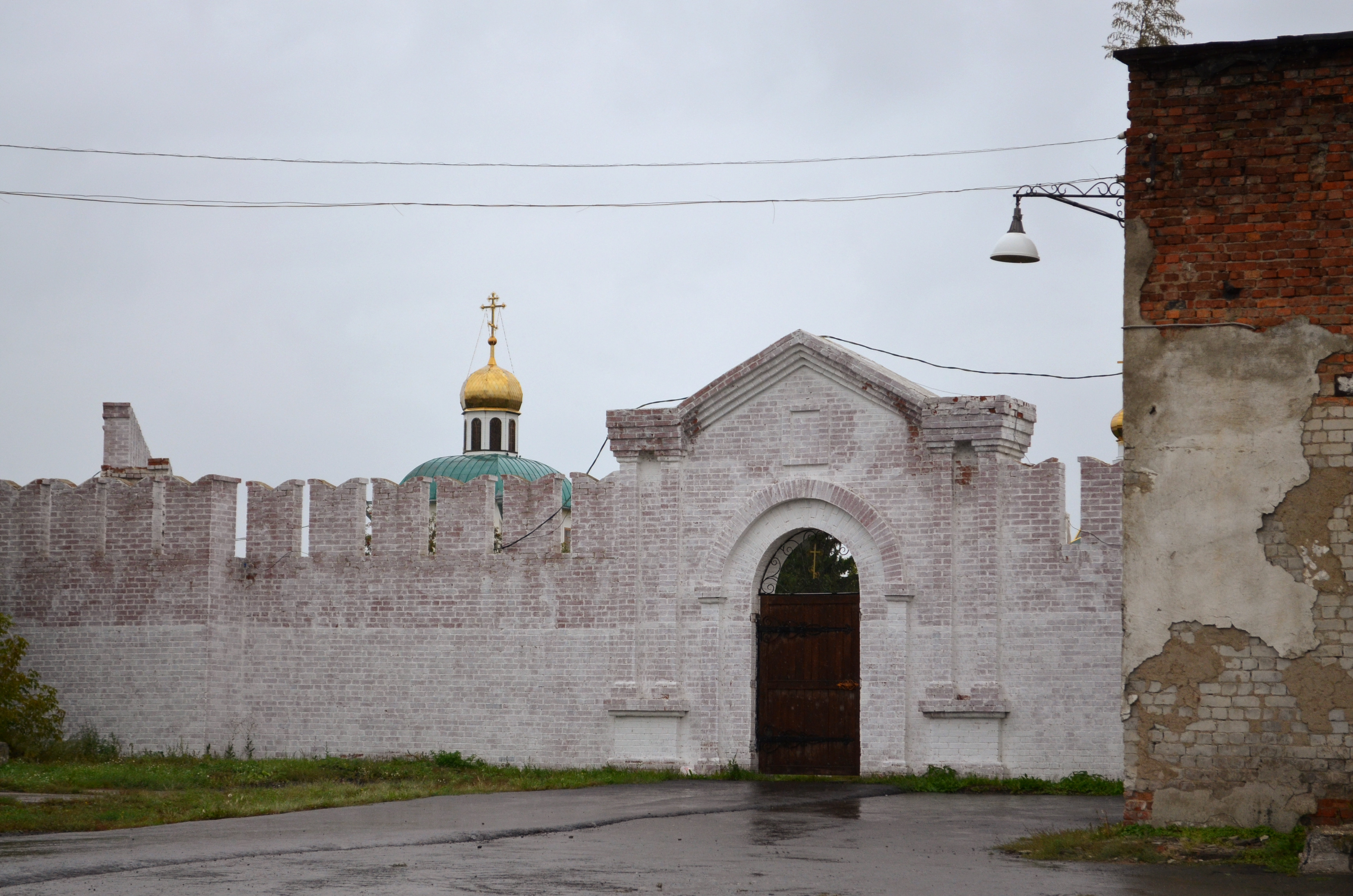 Красный бастион (башня западная) (руины) (Курганская область, Далматово, улица Советская, 63)